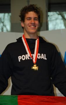 Ricardo Varela